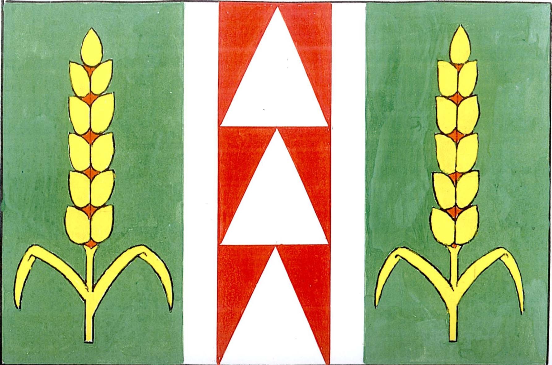 Česky: vlajka obce Svésedlice